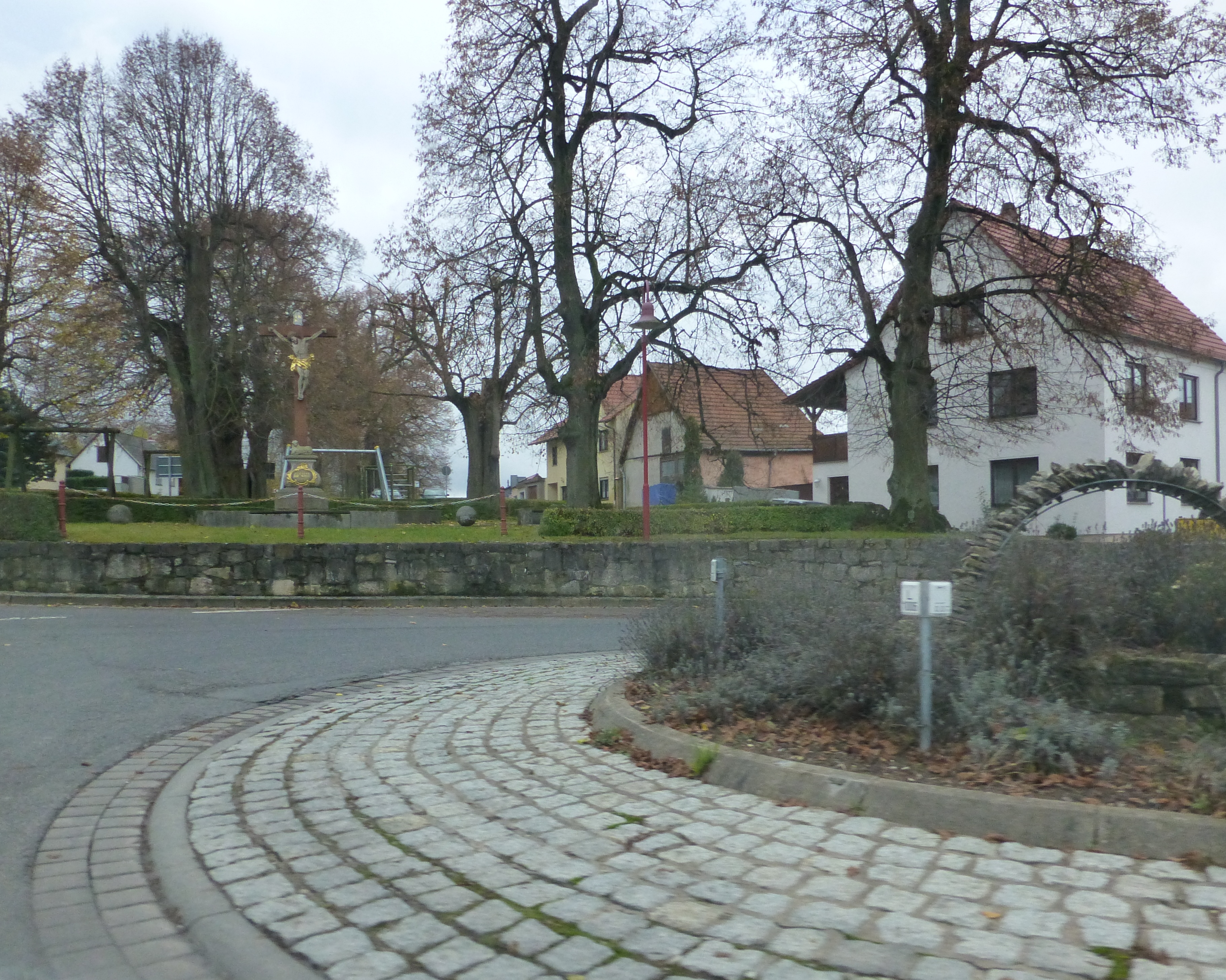 Kreisel in Wachstedt, dahinter ein Wegekreuz